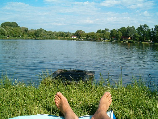 Csomor-horgaszto